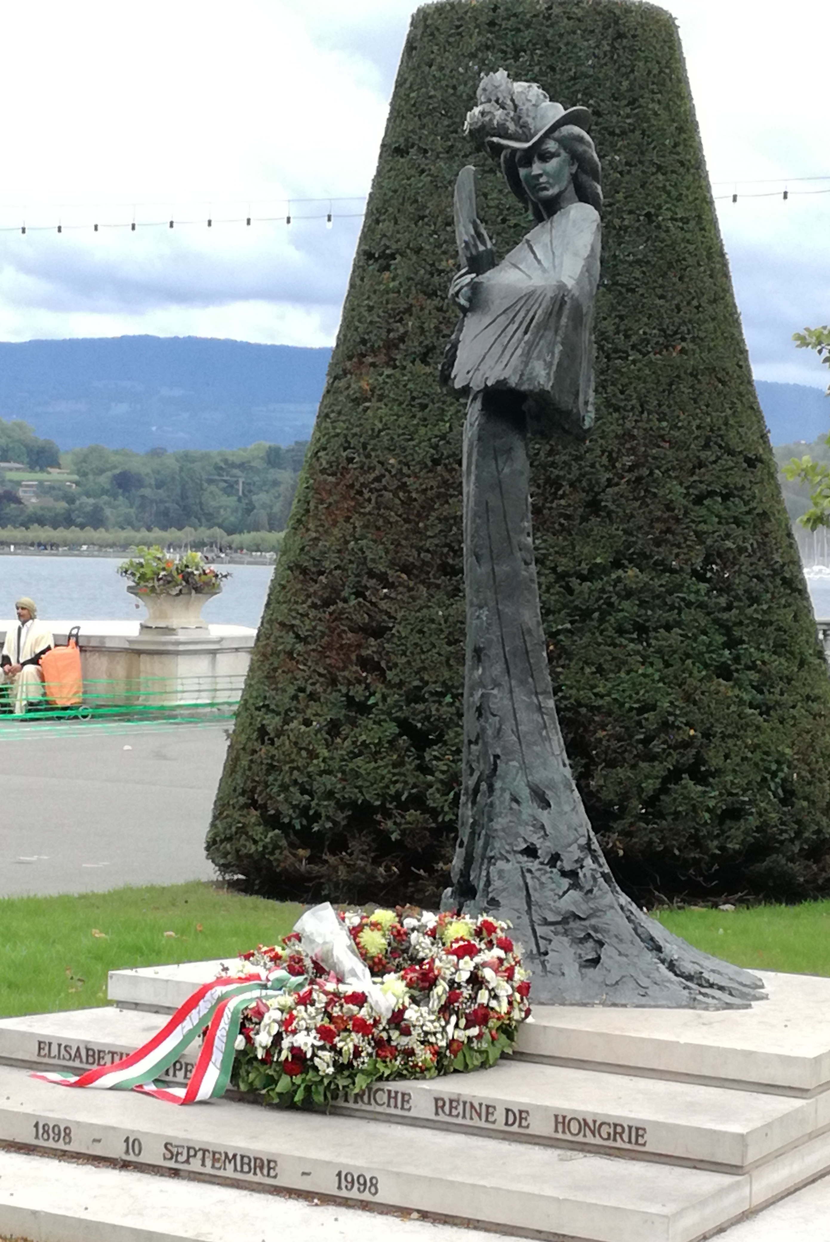 Pomnik cesarzowej Elżbiety w Genewie nad Jeziorem Genewskim w pobliżu miejsca, w którym została zamordowana 10 września 1898 roku.